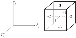 Désignation des faces d'un cube utilisée notamment en mécanique des milieux continus. Auteur : Christophe Dang Nogc Chan (Cdang)